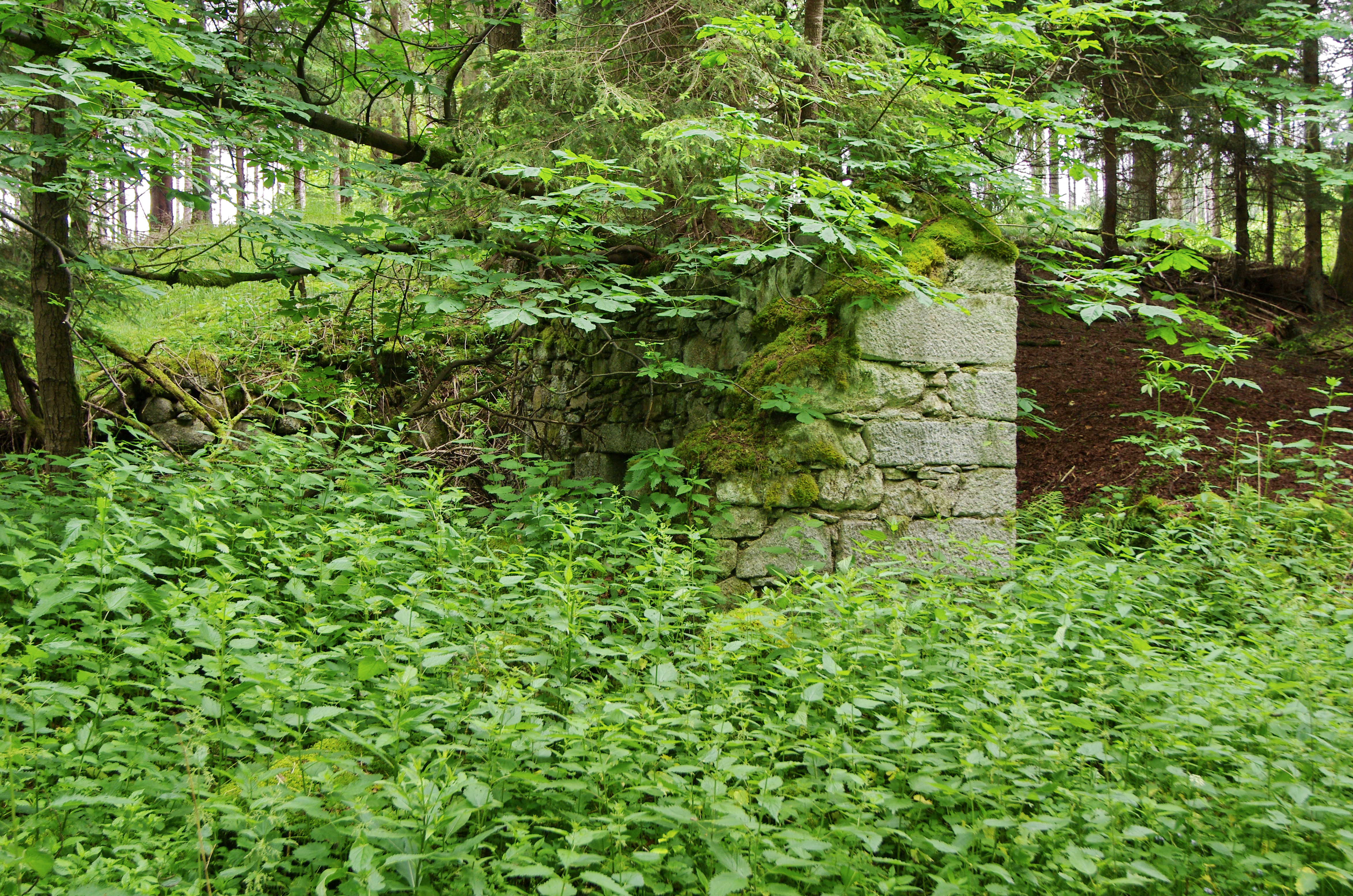 Pozůstatky Bühnlova mlýna na Lobezské potoce, Slavkovský les, okres Sokolov